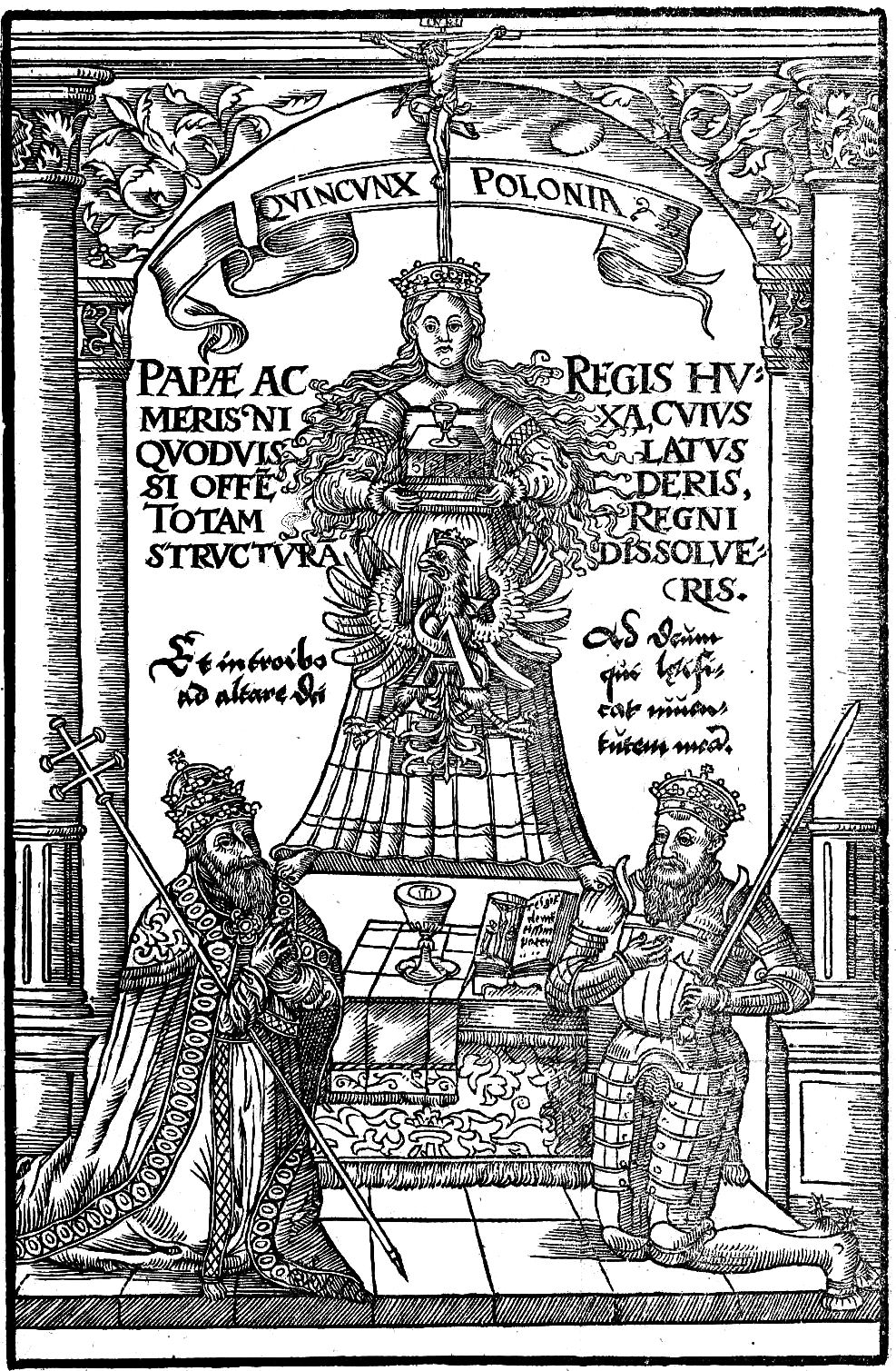 Conception of Polish Monarchy in Quincunx by Stanisław Orzechowski 1564